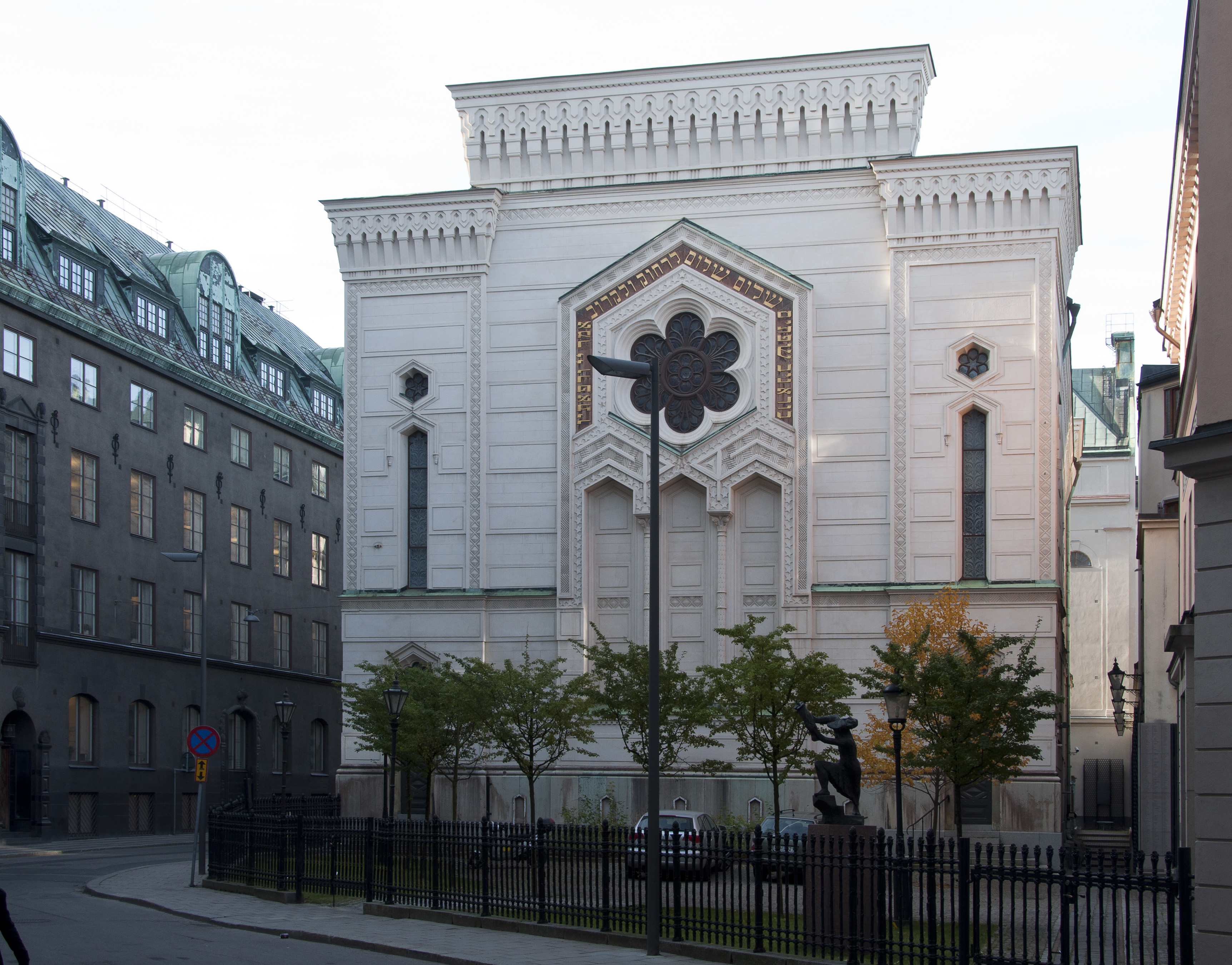 Stockholms synagoga